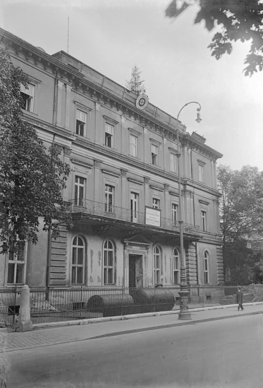 München-die Hauptstadt der Bewegung! Das Braune Haus in München, das nach dem Anwachsen der Partei aus kleinsten Anfängen die Zentralleitung beherbergte, nach dem Ausbau im Jahr 1930, mit dem provisorischen Hoheitszeichen und Richtkranz.